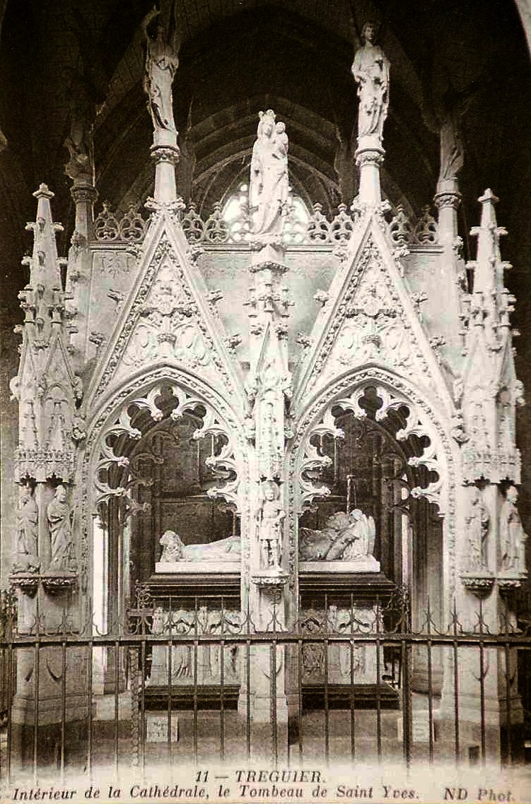 Monument de Saint Yves (1888)